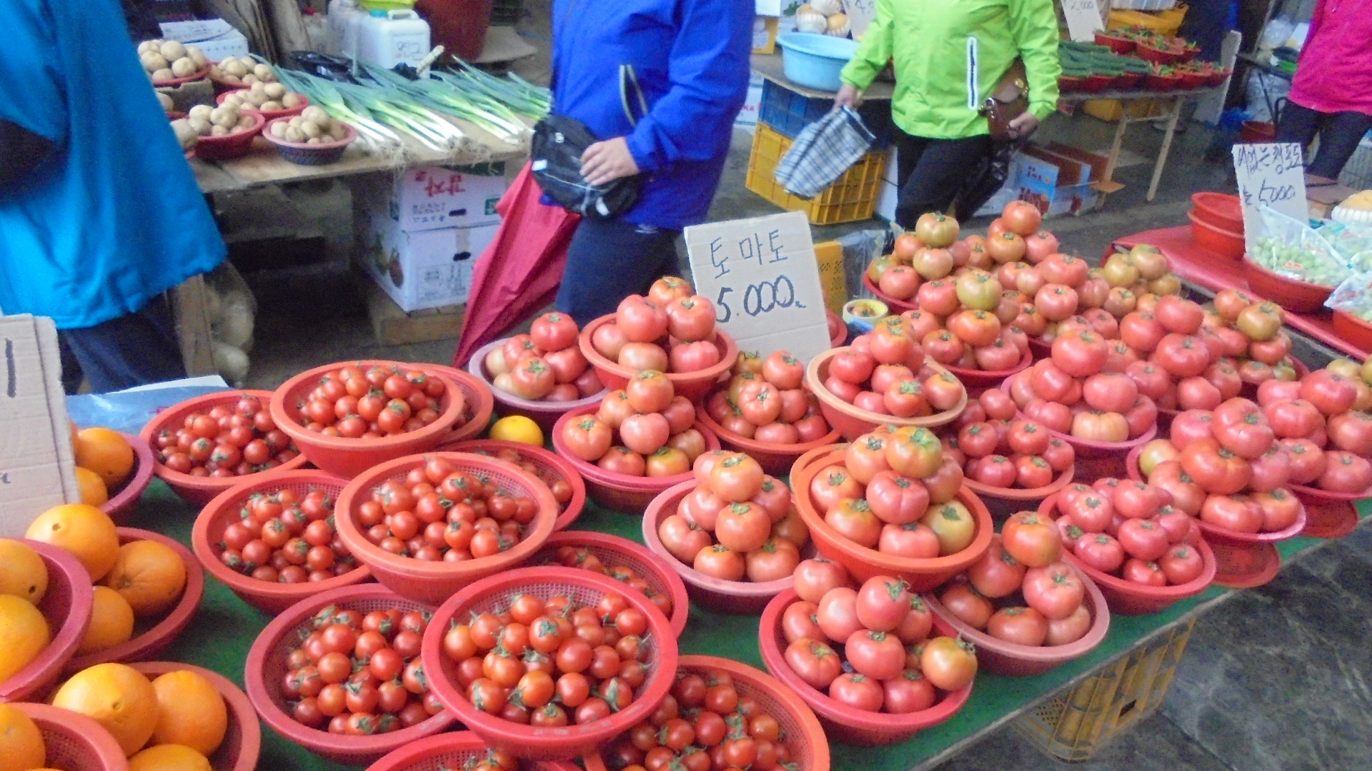 韓国の市場です。